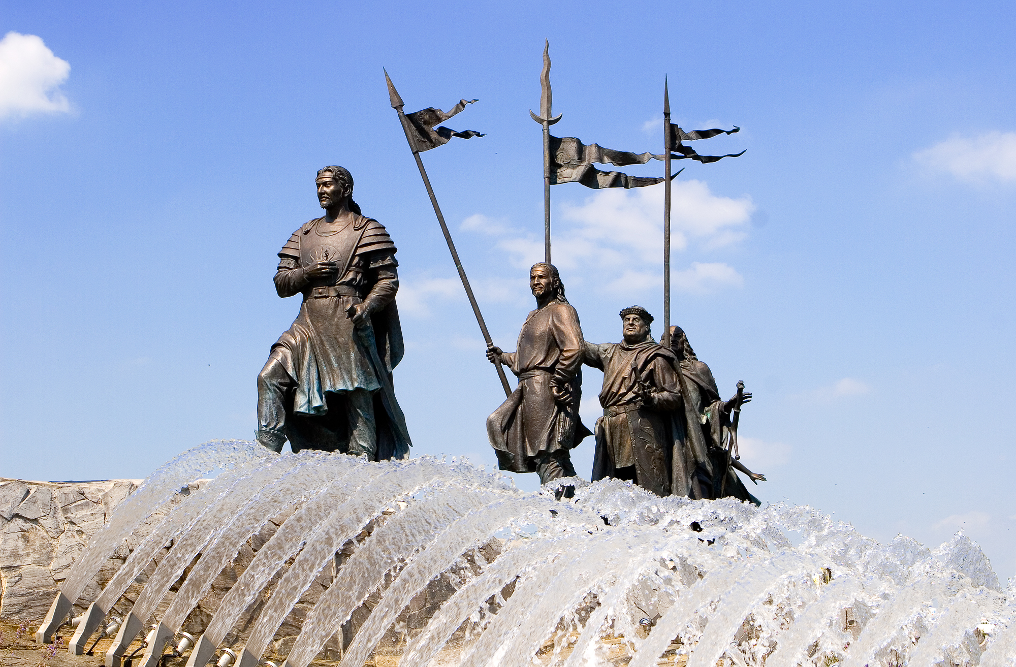 Der Nibelungenbrunnen in Tulln ist eine Gestaltung der Szene "Begegnung von Kriemhild, der Burgunderkönigin, und dem Hunnenkönig Etzel in Tulln" in Form einer Bronzeskulpturen-Dokumentation, geschaffen vom Bildhauer Michail Nogin. Der Brunnenbildhauer Prof. Hans Muhr ergänzt das Kunstwerk mit einer integrativen und ästhetischen Licht-Wasser-Sein-Komposition.